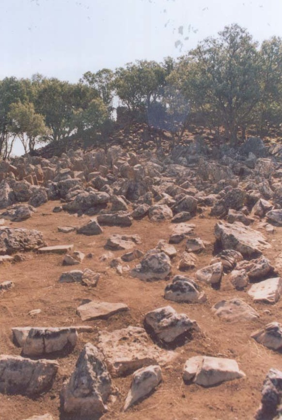 Vista de las piedras hincadas (Chevaux de frises).